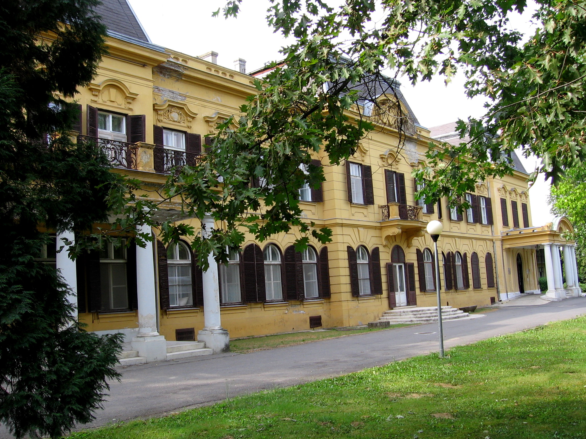 Széchenyi kastély